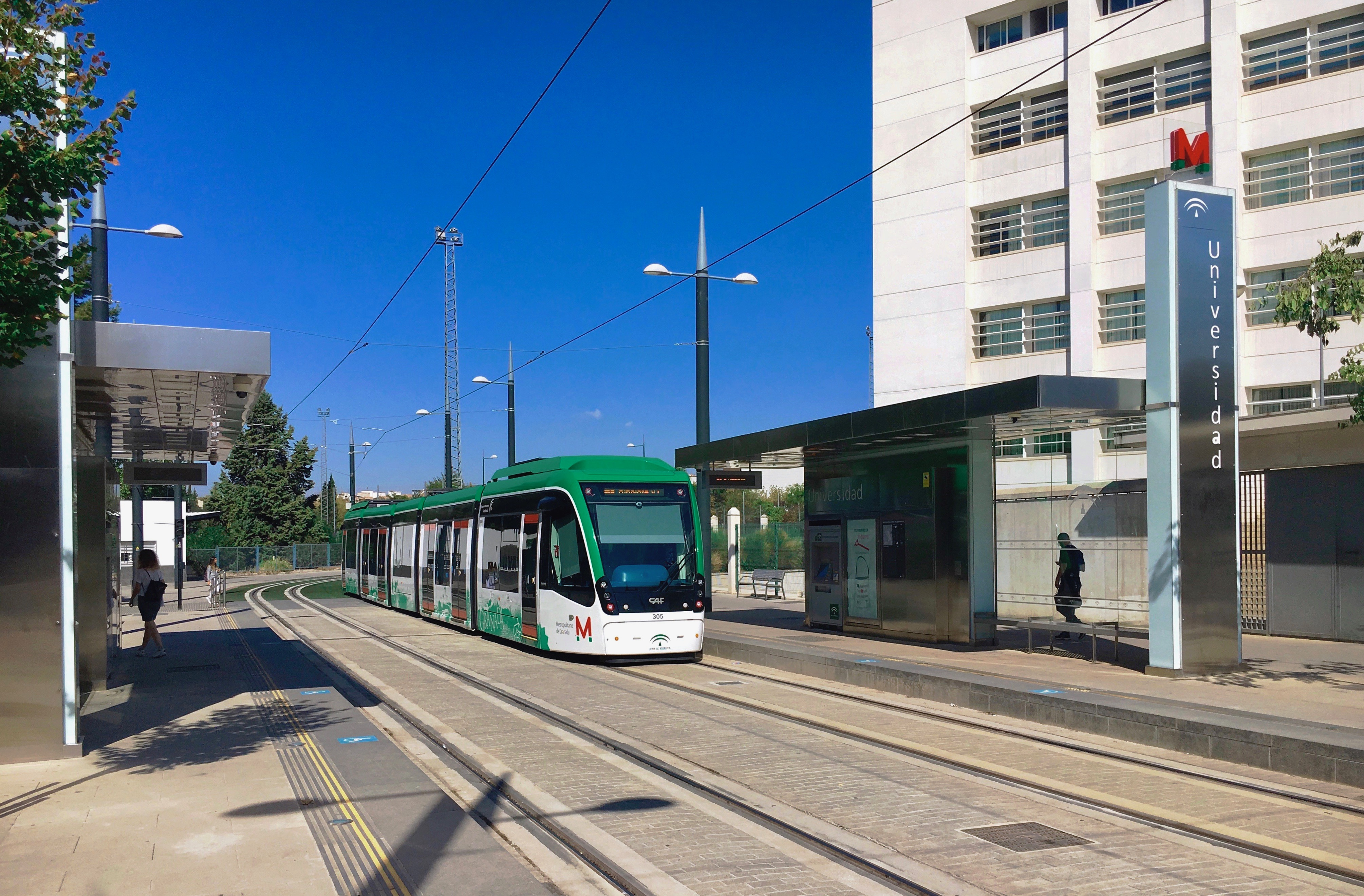 Estación de Universidad del Metro de Granada situada en el Campus de Fuentenueva.